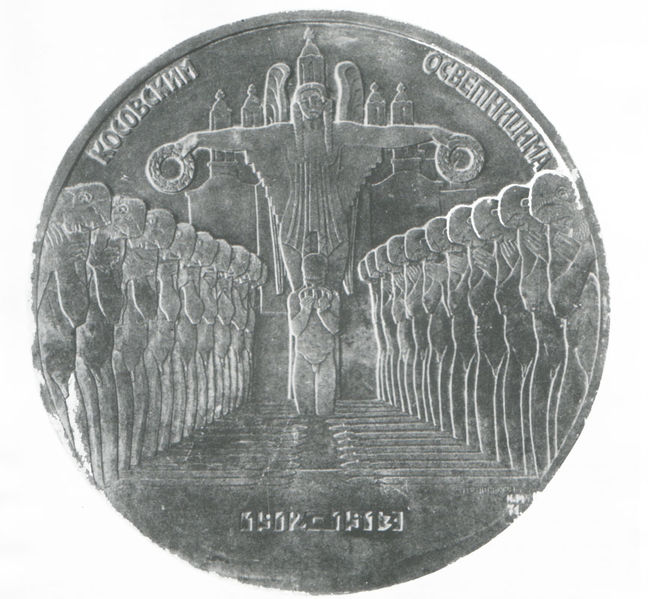 Ivan Meštrović-medalja Kosovo